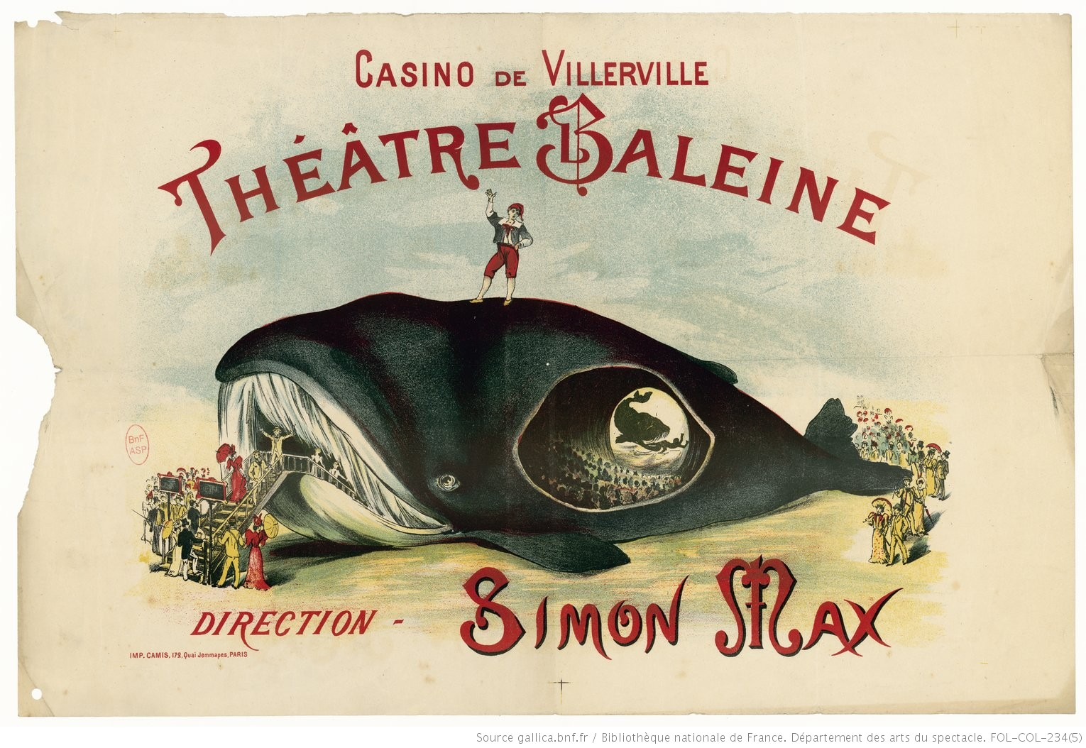 Ouverture du théâtre-baleine. Affiche du théâtre de la Baleine Fonds Maxime-Fabert (1899-1978). I. Famille Simon-Girard. I.2. Simon Max et Juliette Simon-Girard. Simon Max. Casino de Villerville (1893-1913). Baleine de Villerville.